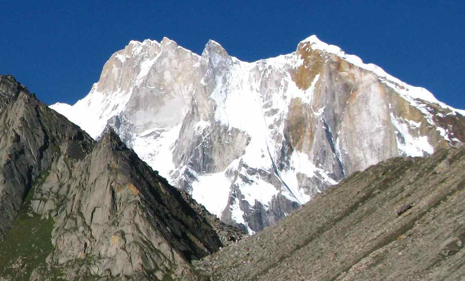 Meru Peak, in India.